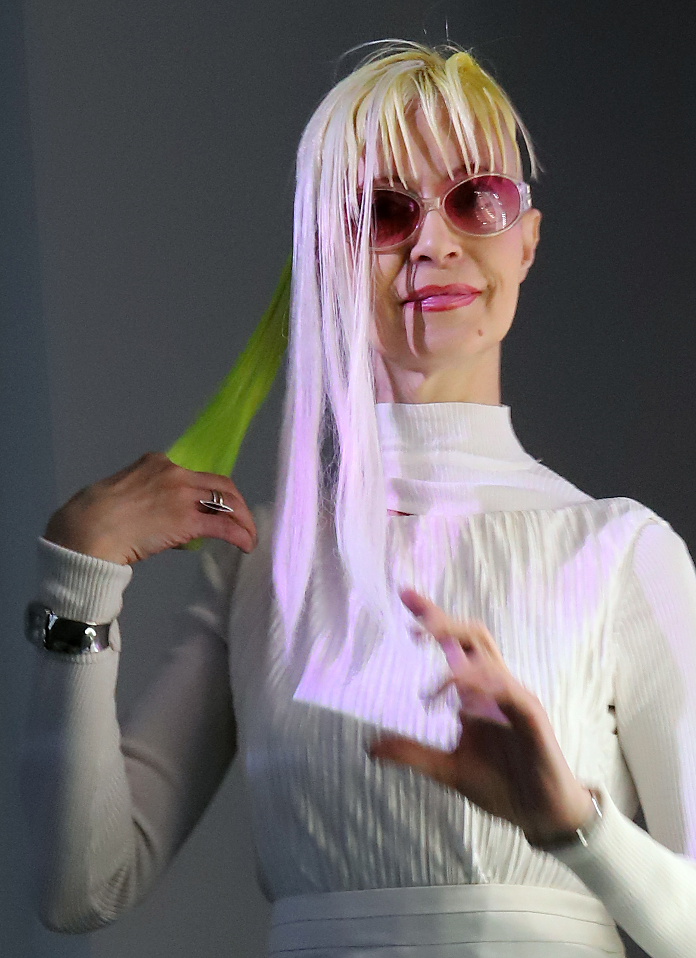 Meeli Kõiva, valgusskulptor, multimeedia kunstnik ja maalija 2020